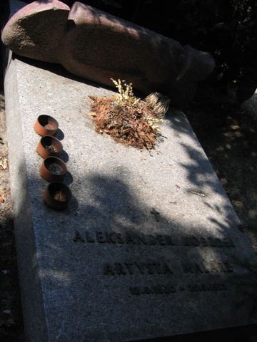 Aleksander Kobzdej's monument (Powązki Cemetery; Cmentarz Komunalny, d. Wojskowy)